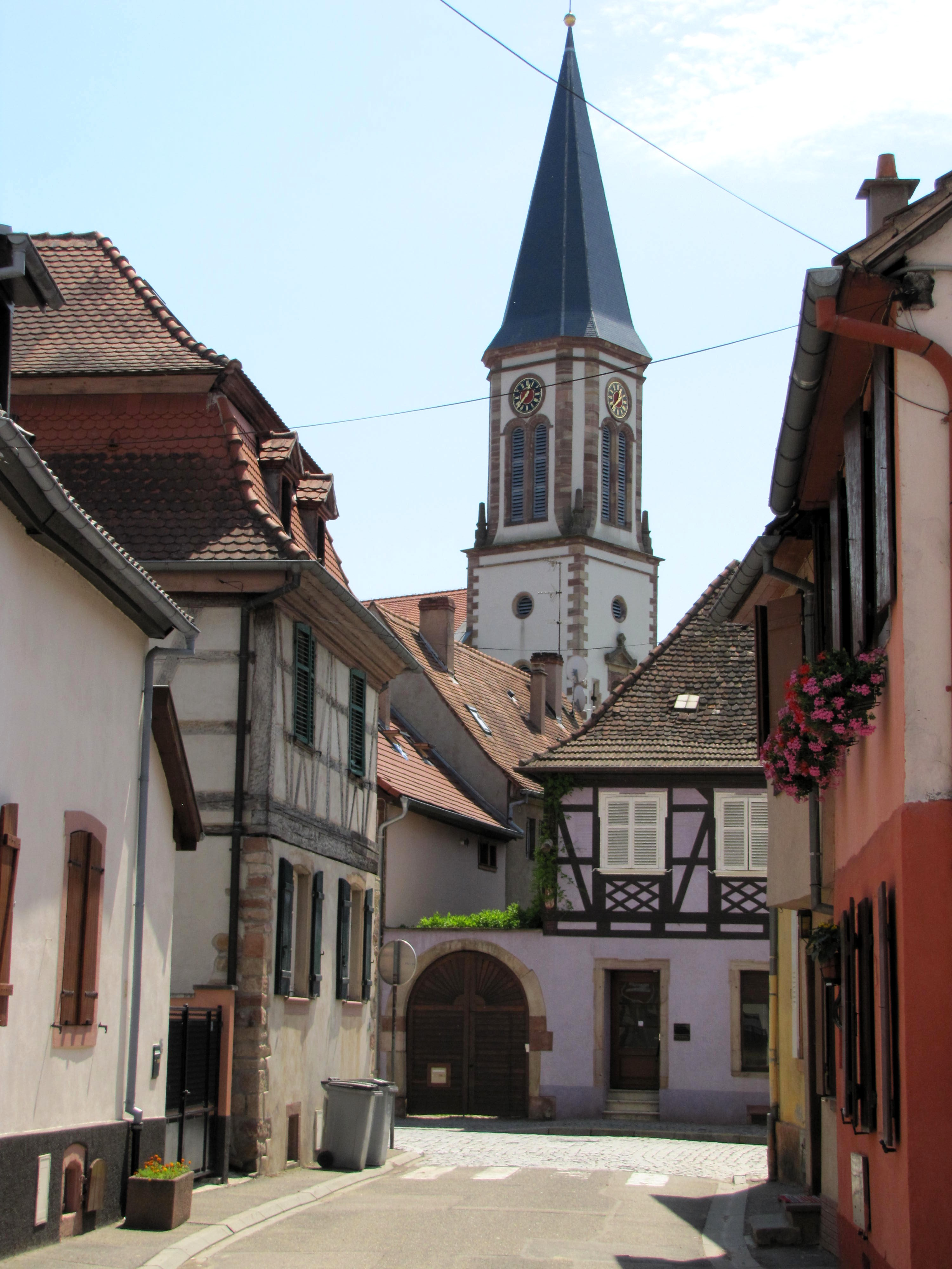 Alsace, Bas-Rhin, Benfeld, Église Saint-Laurent (IA00023501).